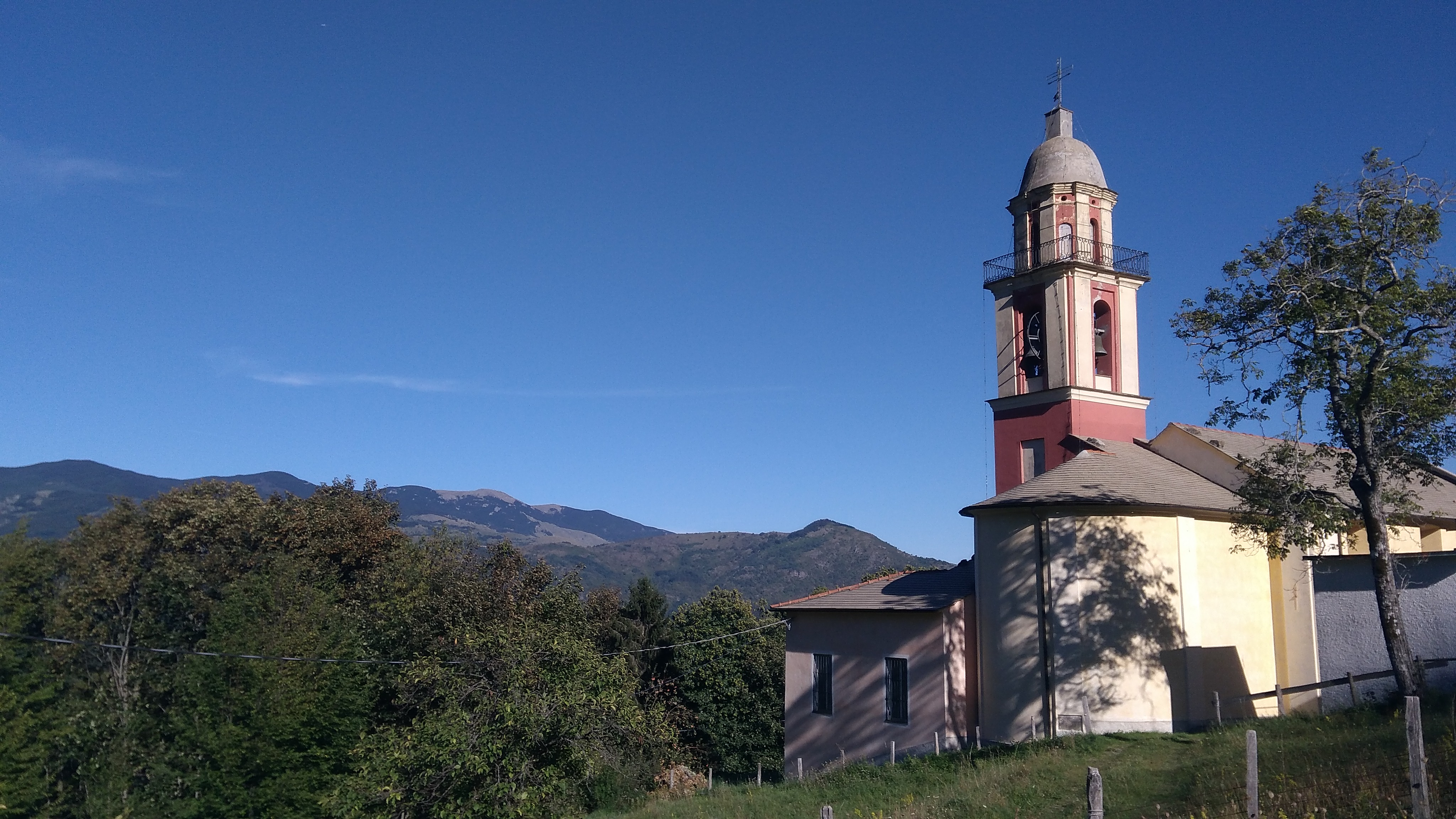 Abside e campanile della chiesa di S. Rocco in Acero